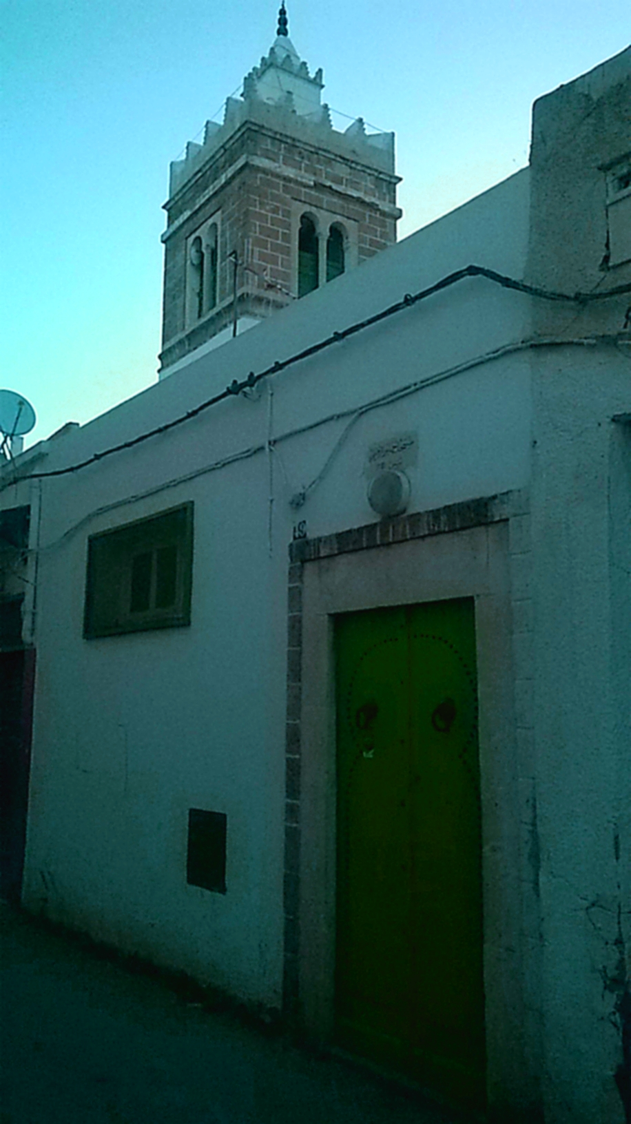 El Halfaouine , la médina de Tunis الحلفاوين , مدينة تونس العتيقة